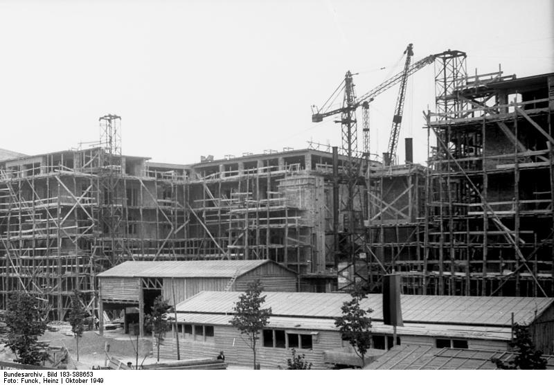 Berlin 1949 U. B. z.: Der Bau der Sowjetischen Botschaft Unter den Linden. Aufn.: Illus/Funck 4135-49 10.10.49